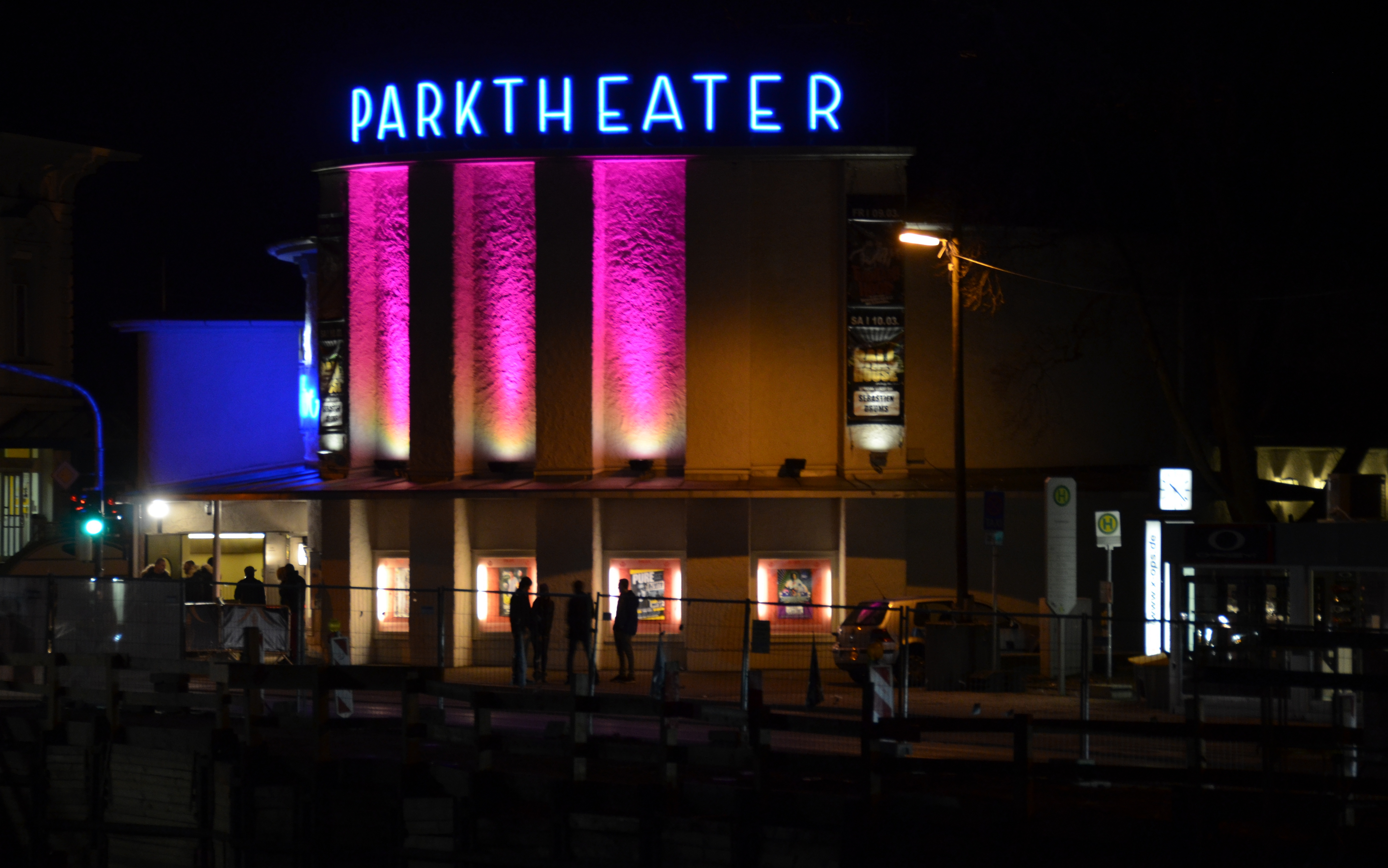 Das Parktheater in Kempten bei Nacht, Aufnahme vom März 2012